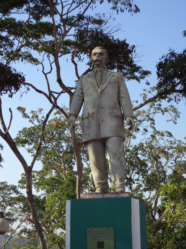 Monumento en Homenaje a Don Nicolás Suárez Callaú This medium shows the protected monument with the number N/00-006 in Bolivia.